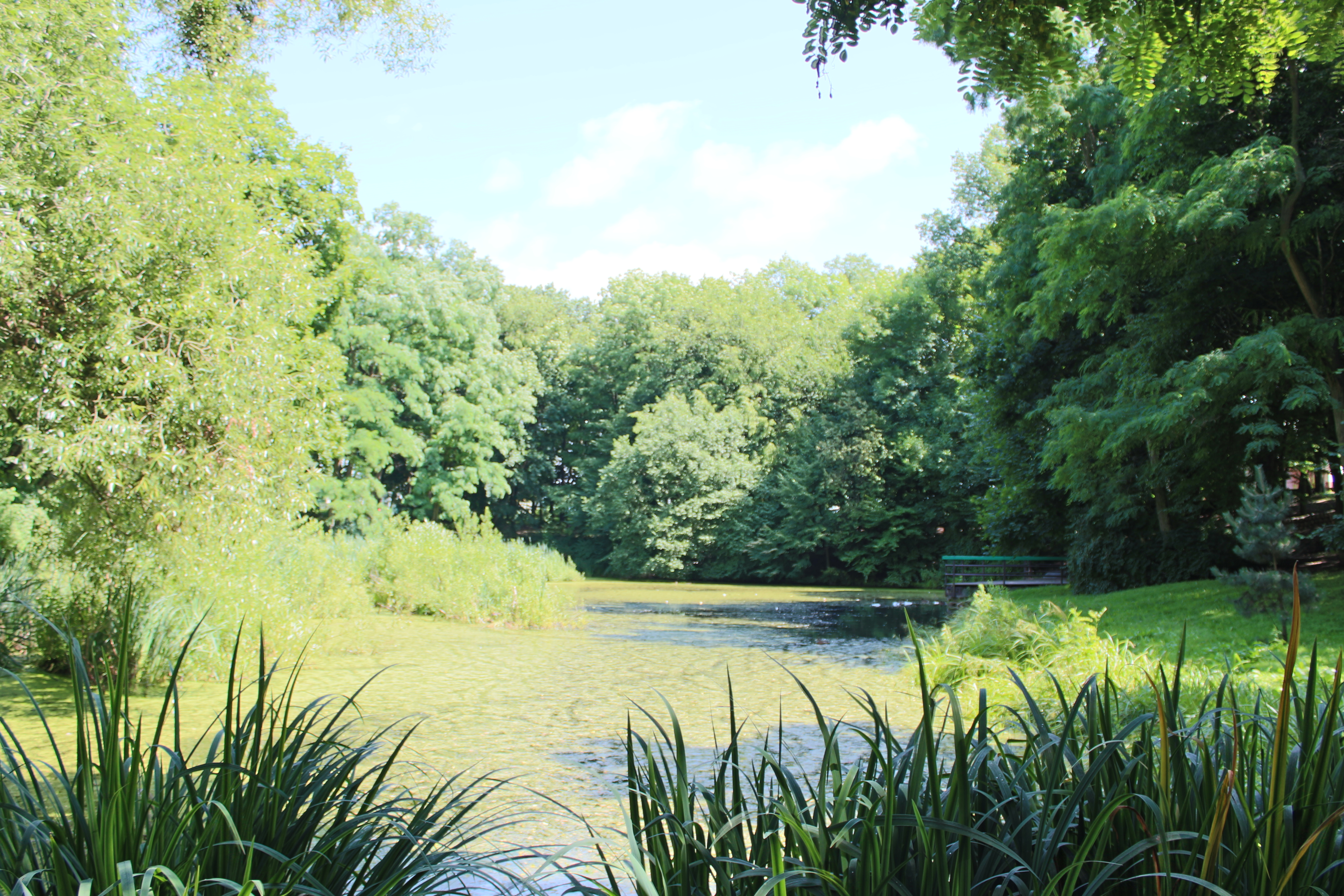 Osowa Góra, Bydgoszcz, Poland